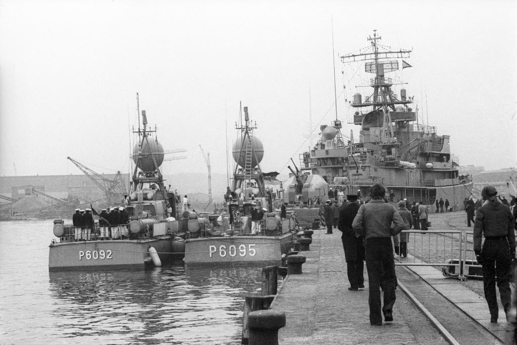 mit den Schnellbooten ZOBEL (P 6092) und HERMELIN (P 6095) am Sartorikai zum Kieler Umschlag 1977.